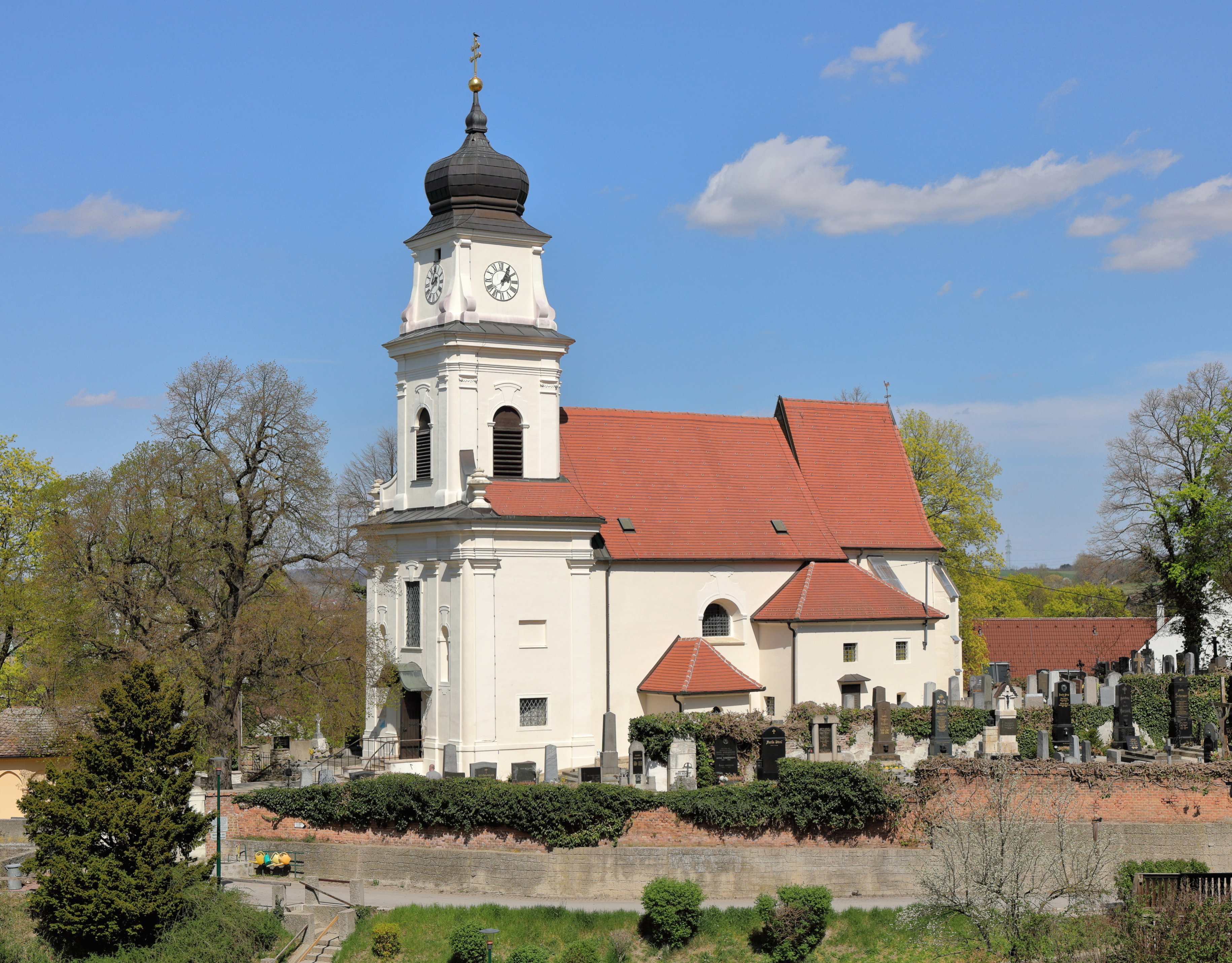 Südwestansicht der röm.-kath. Pfarrkirche hl. Johannes der Täufer in der niederösterreichischen Marktgemeinde Bisamberg.Die Kirche steht erhöht über dem Ort am nordwestlichen Abhang des Bisamberges und ist von einem Friedhof umgeben. Sie ist eine im Kern romanische, barockisierte Saalkirche mit spätgotischem Chor und spätbarockem Westturm. Der tiefe Fassadenvorbau mit Turm wurde von 1720 bis 1735 errichtet.